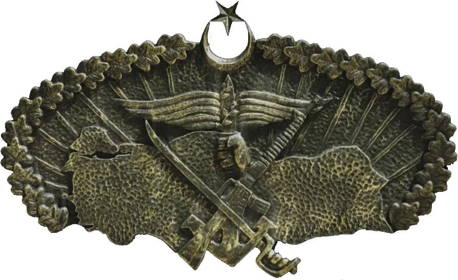 Özel Kuvvetler Komutanlığı Brövesi, Turkish Special Forces (Maroon Berets)